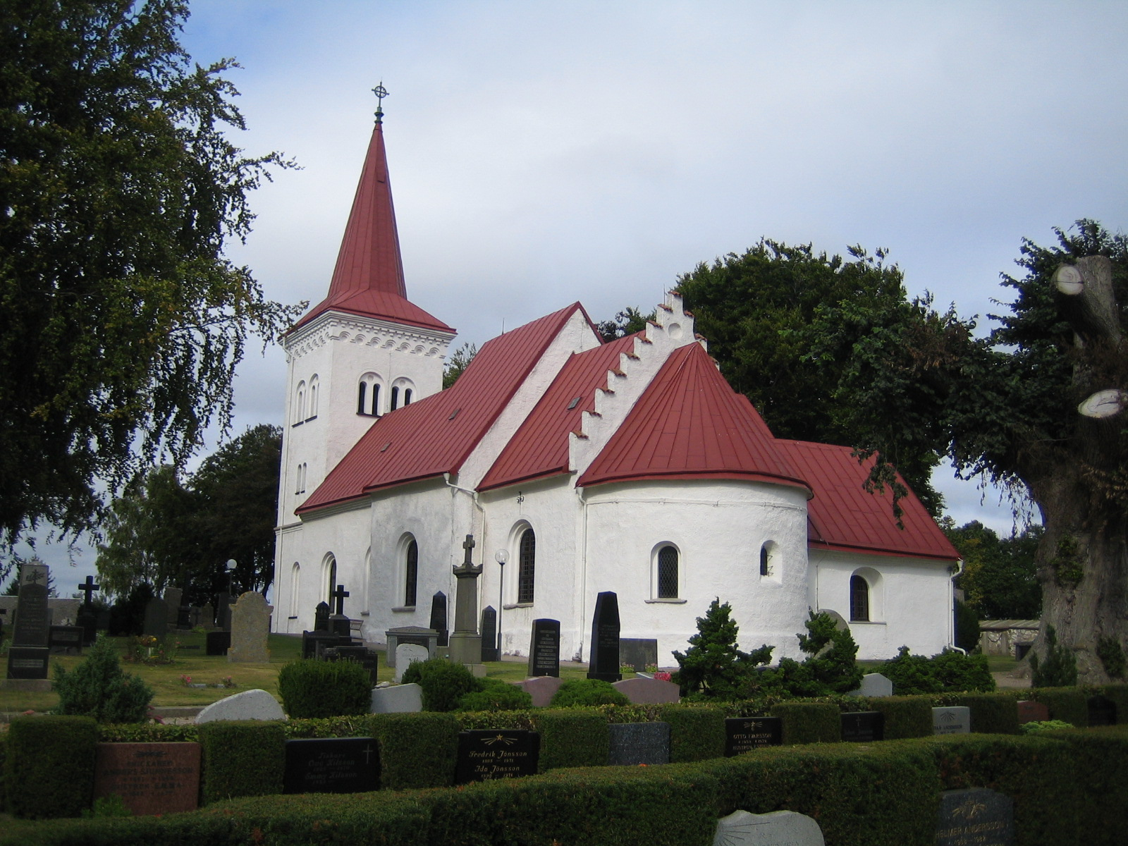 Stora Köpinge kyrka